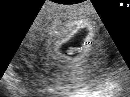 Embryon de 6 semaines. Embryo at 6 weeks.